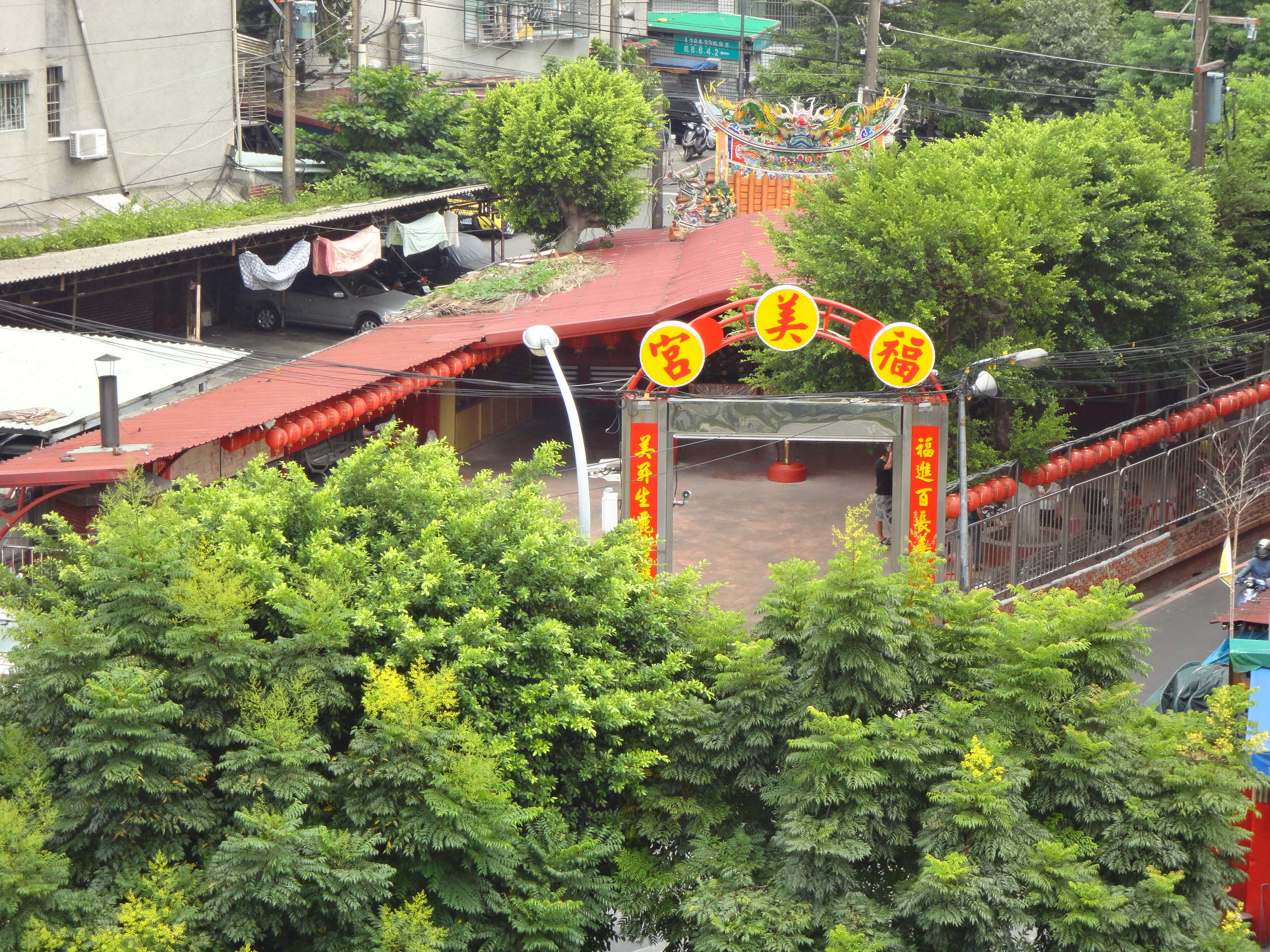 中和福美宮臨南勢角溪下游廟仔尾溝 秋季常見台灣欒樹盛開